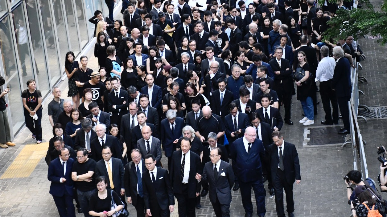 香港立法會法律界議員郭榮鏗估計約3千人參與法律界黑衣靜默遊行, 反對《逃犯條例》修訂。